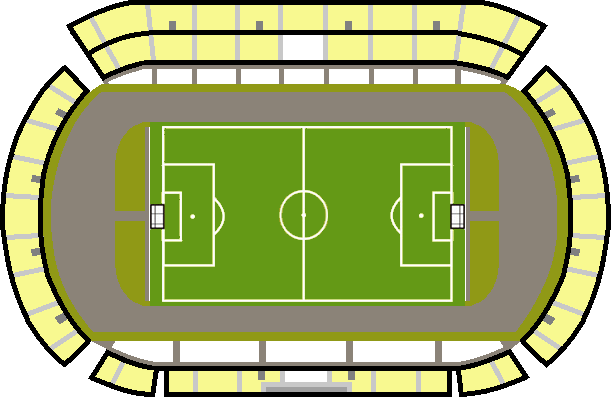 Imagen no oficial que representa el estadio Atilio Paiva Olivera